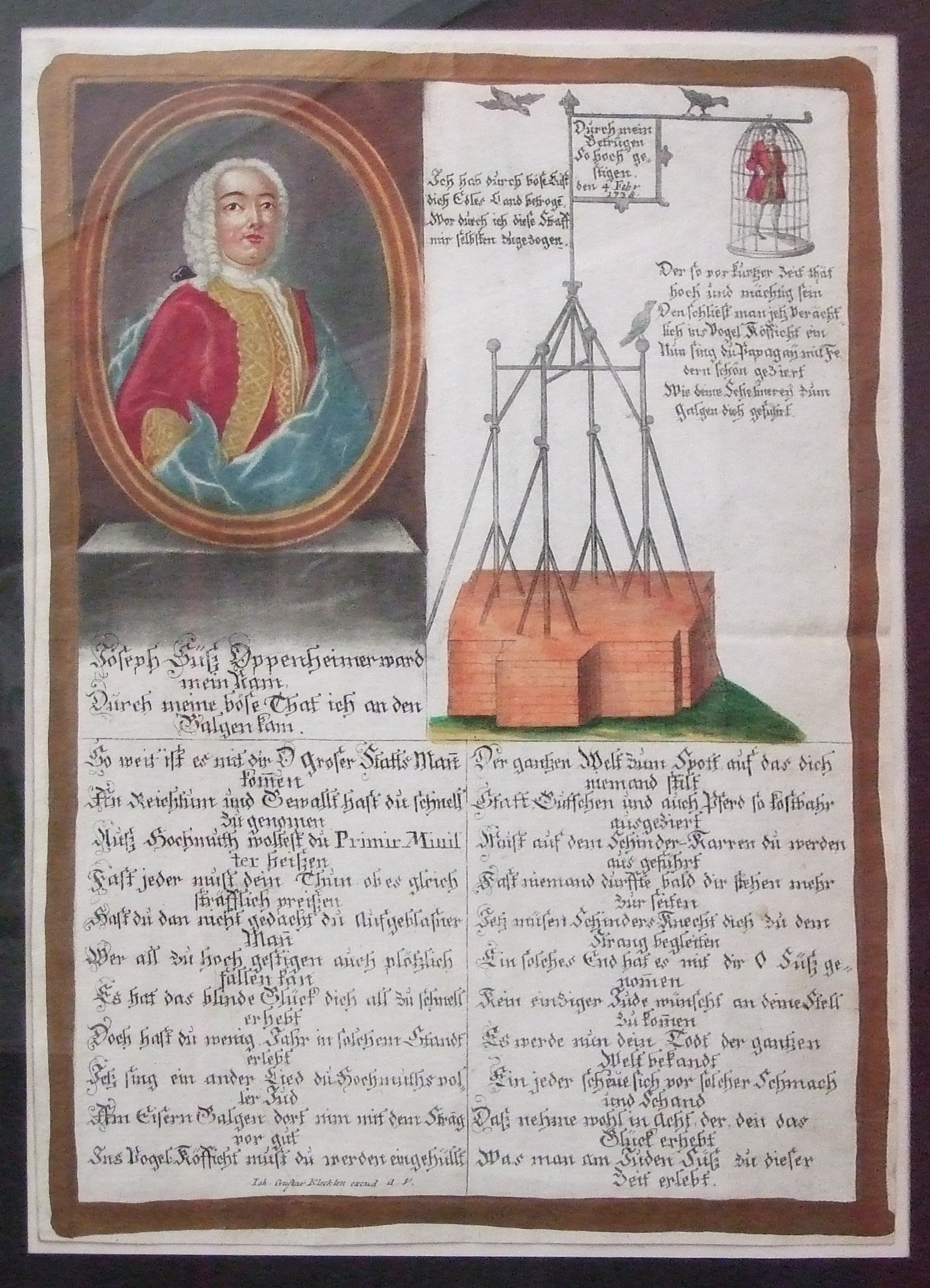 Joseph Süß Oppenheimer - Schmähschrift